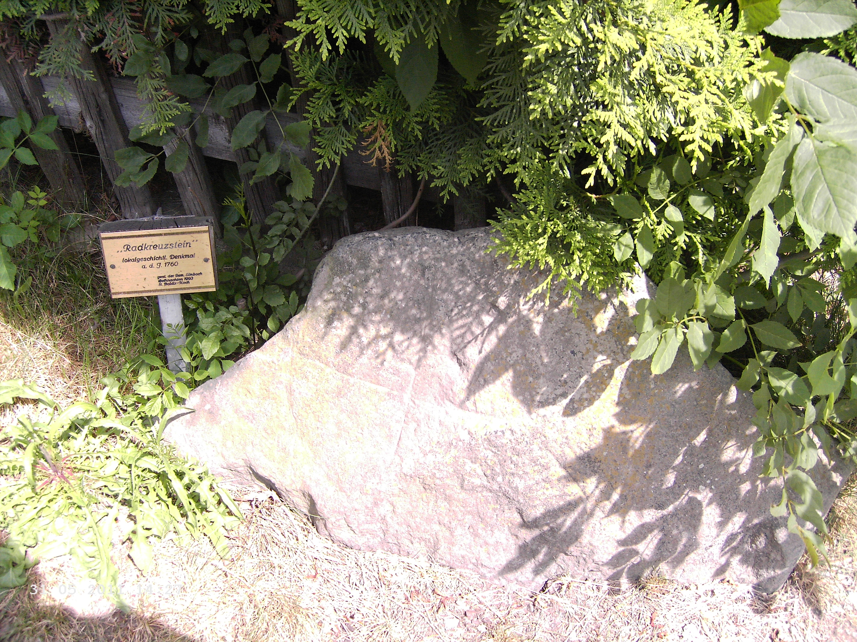 Radkreuzstein lokalgeschitliches Denkmal a. d. Jahr 1760